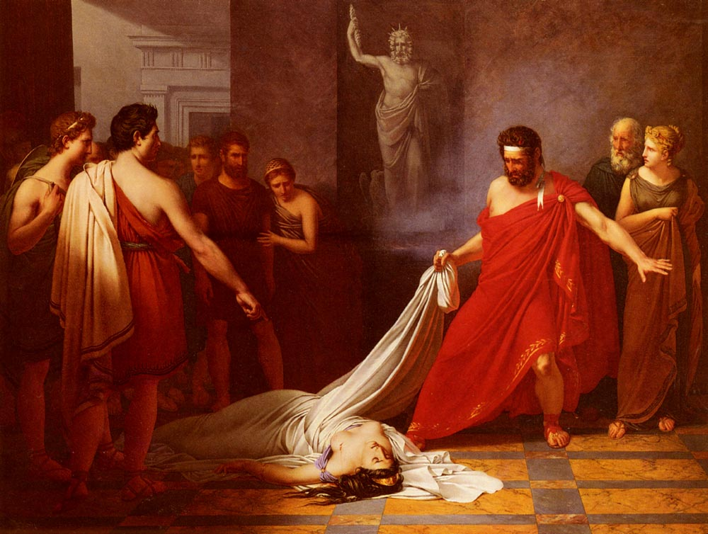 Charles-Auguste Van den Berghe, Égisthe pensant découvrier le corps d'Oreste mort, découvre celui de Clytemnestre, 1823, huile sur toile, localisation inconnue.